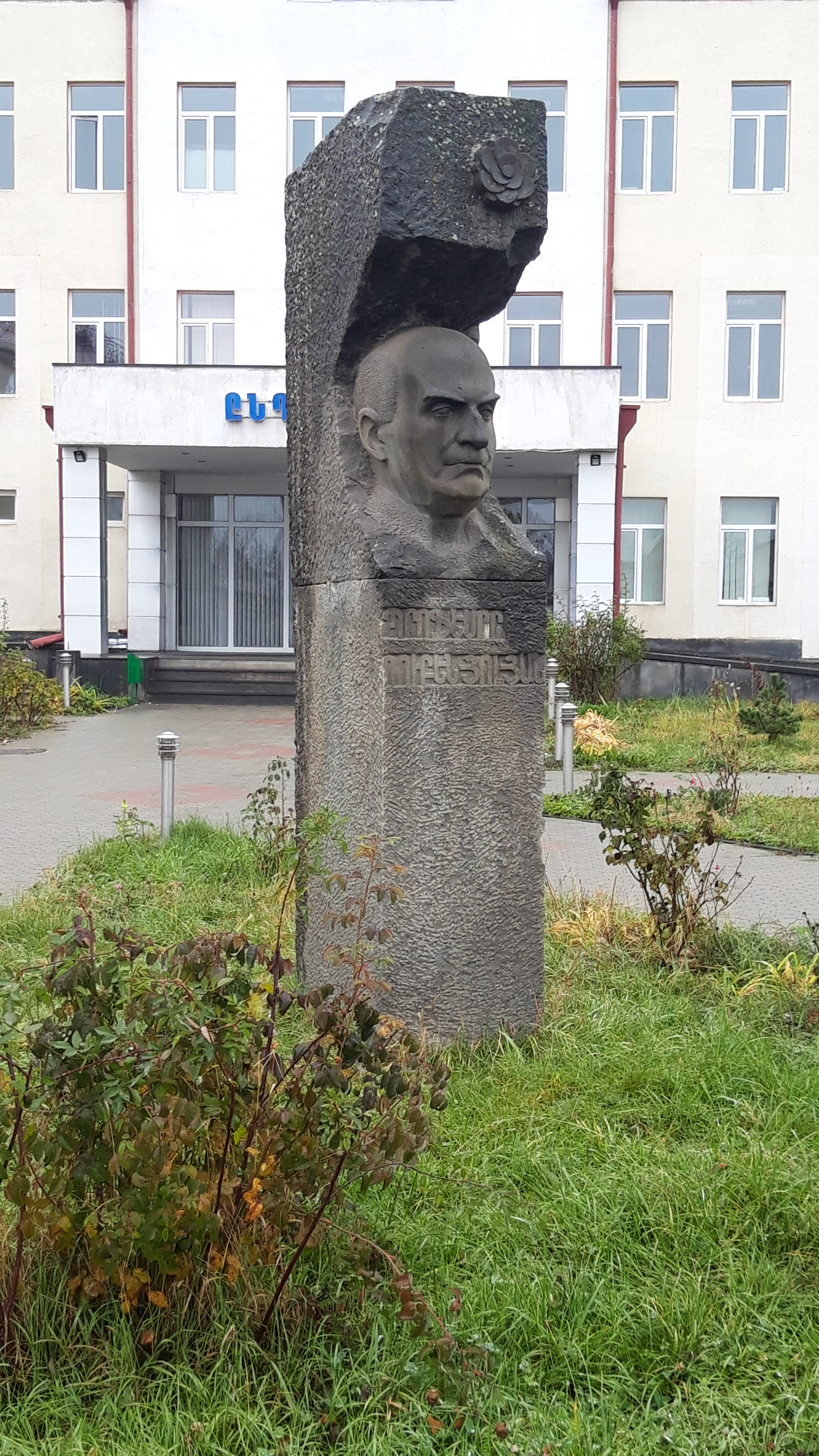 Ռուբեն Յոլյանի կիսանդրին՝ Գորիսի բժշկական կենտրոնի մոտ